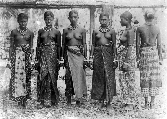 Repronegatief. Vrouwen van Ceram, residentie Ambon